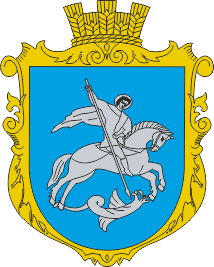 Герб с. Виноградівка (Болградський район)